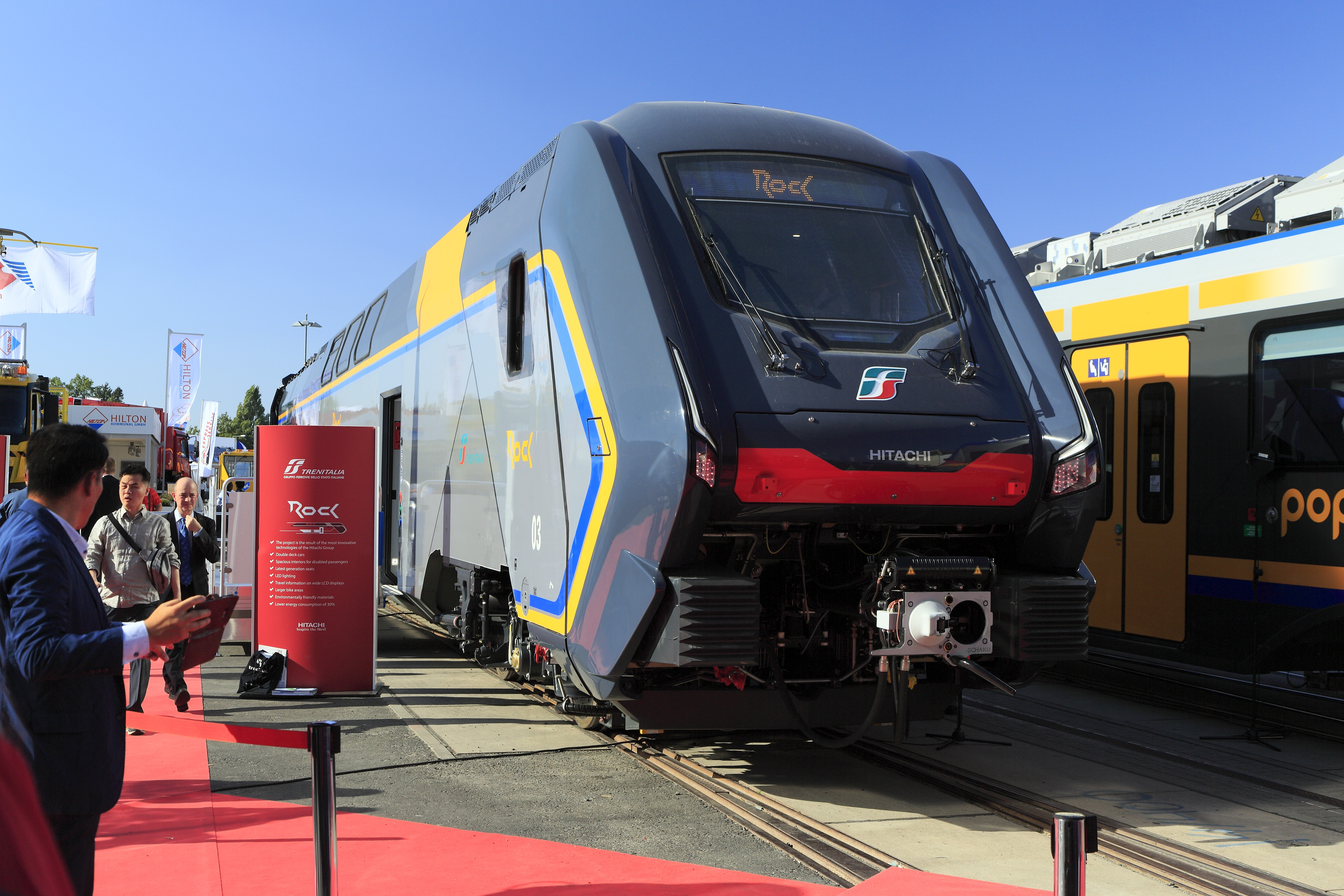 Doppelstocktriebzug für die Trenitalia, der Hersteller Hitachi erscheint ausgesprochen ungewohnt. Der japanische Konzern übernahm allerdings 2018 den italienischen Traditionshersteller AnsaldoBreda.